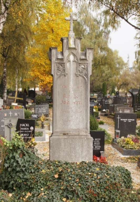 Grab von Johann und Joseph Rint (beide Bildhauer, Vater und Sohn) am St. Barbara-Friedhof, Linz-Lustenau